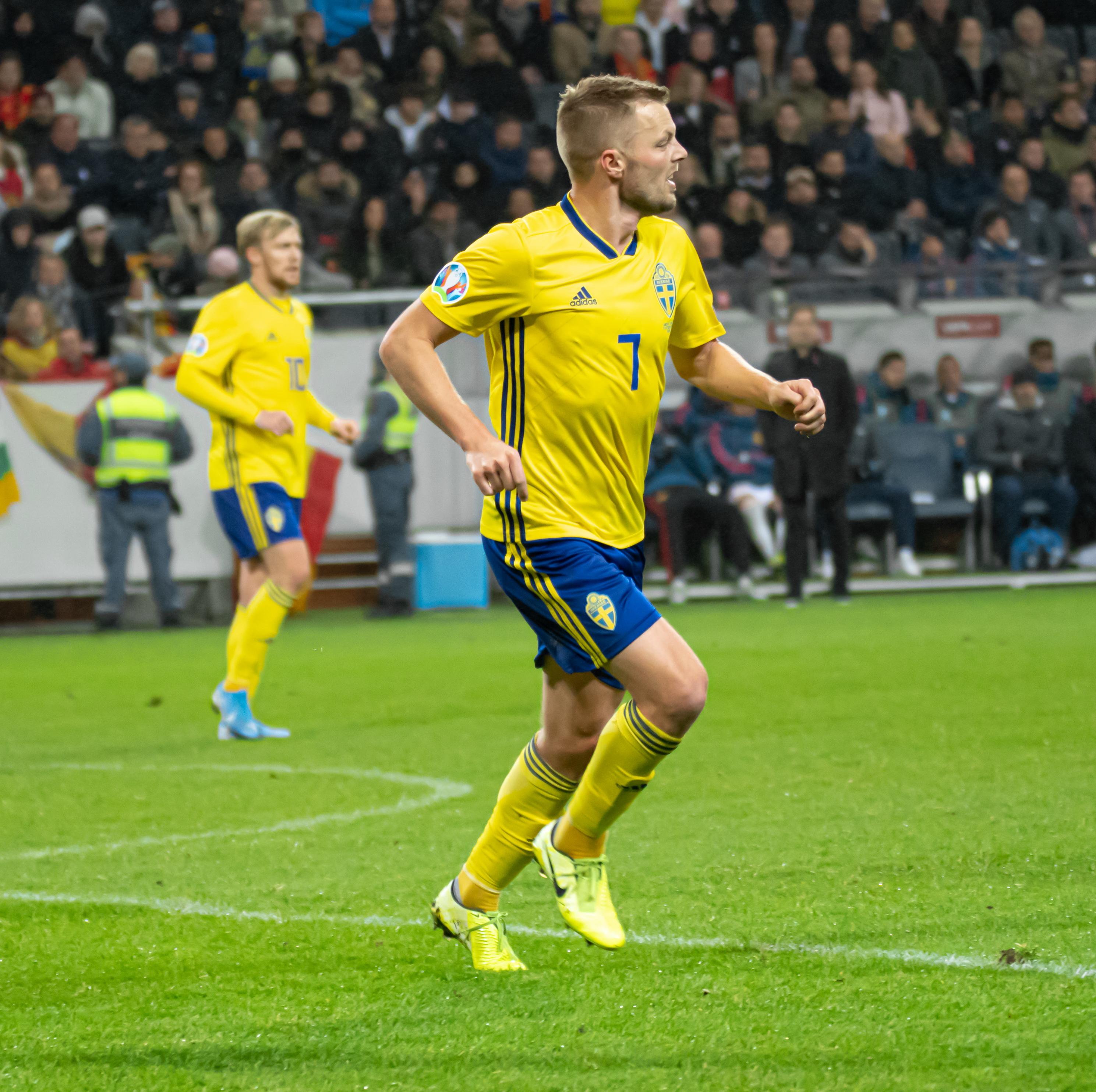 UEFA EURO qualifiers Sweden vs Spain 20191015